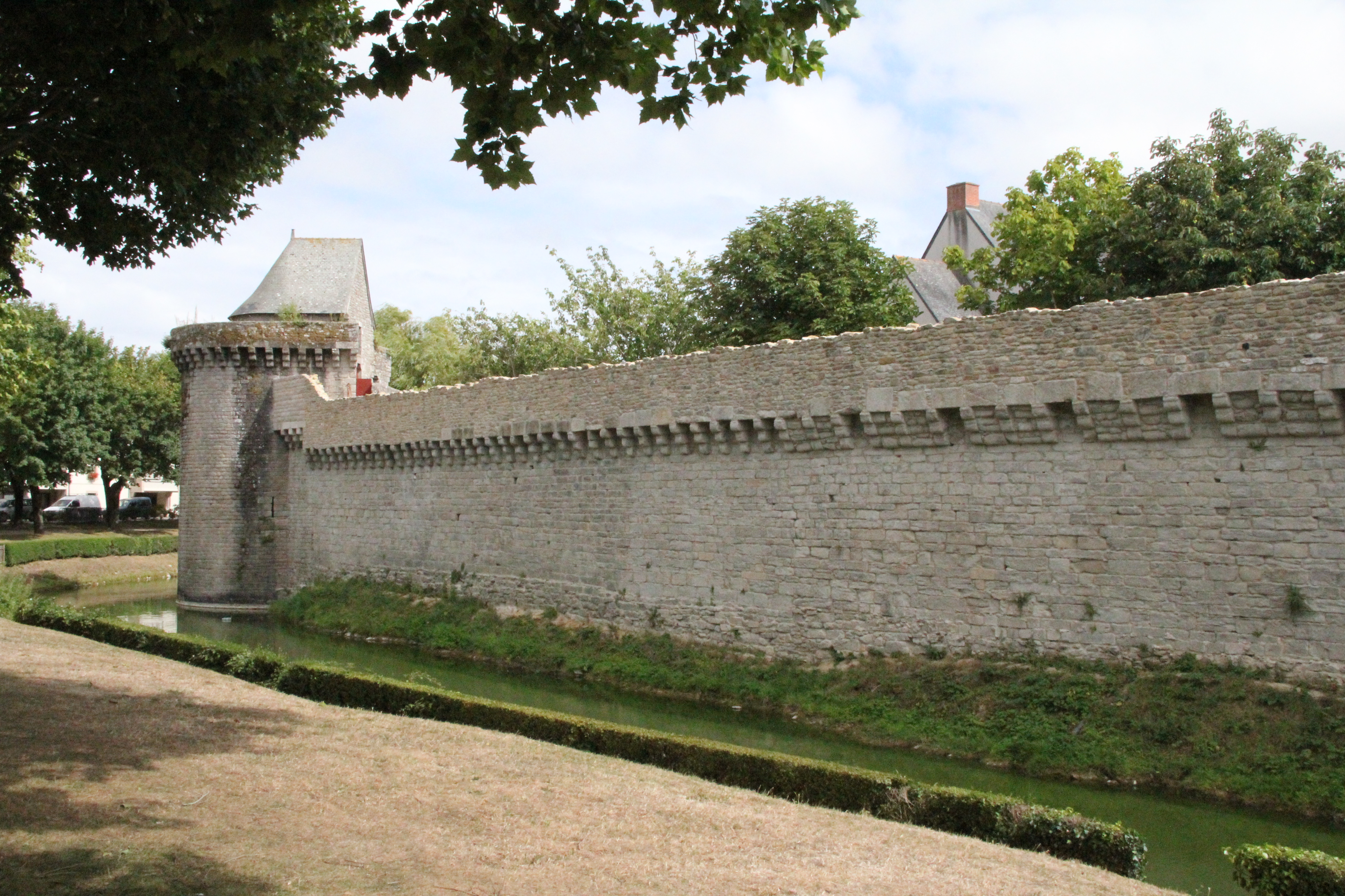 rempart entourant Guérrande